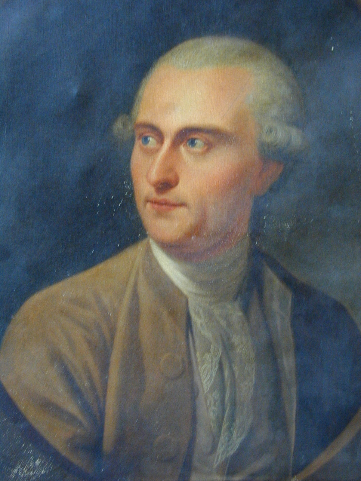 Feminis Bild der Firma Johann Anton Farina the uploader seems to claim that this is a fake? See #filehistory. Who is depicted?